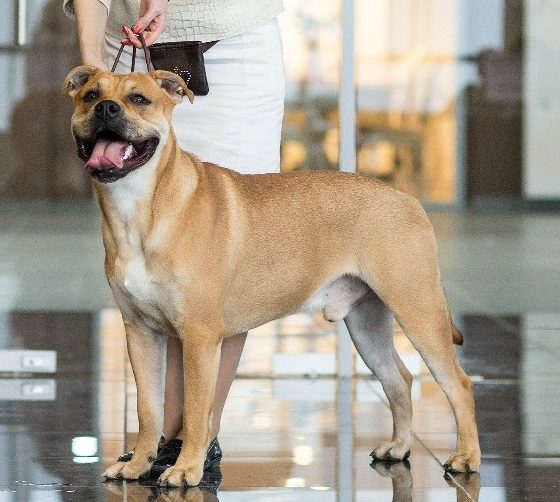 Кобель-юниор Ка де Бо